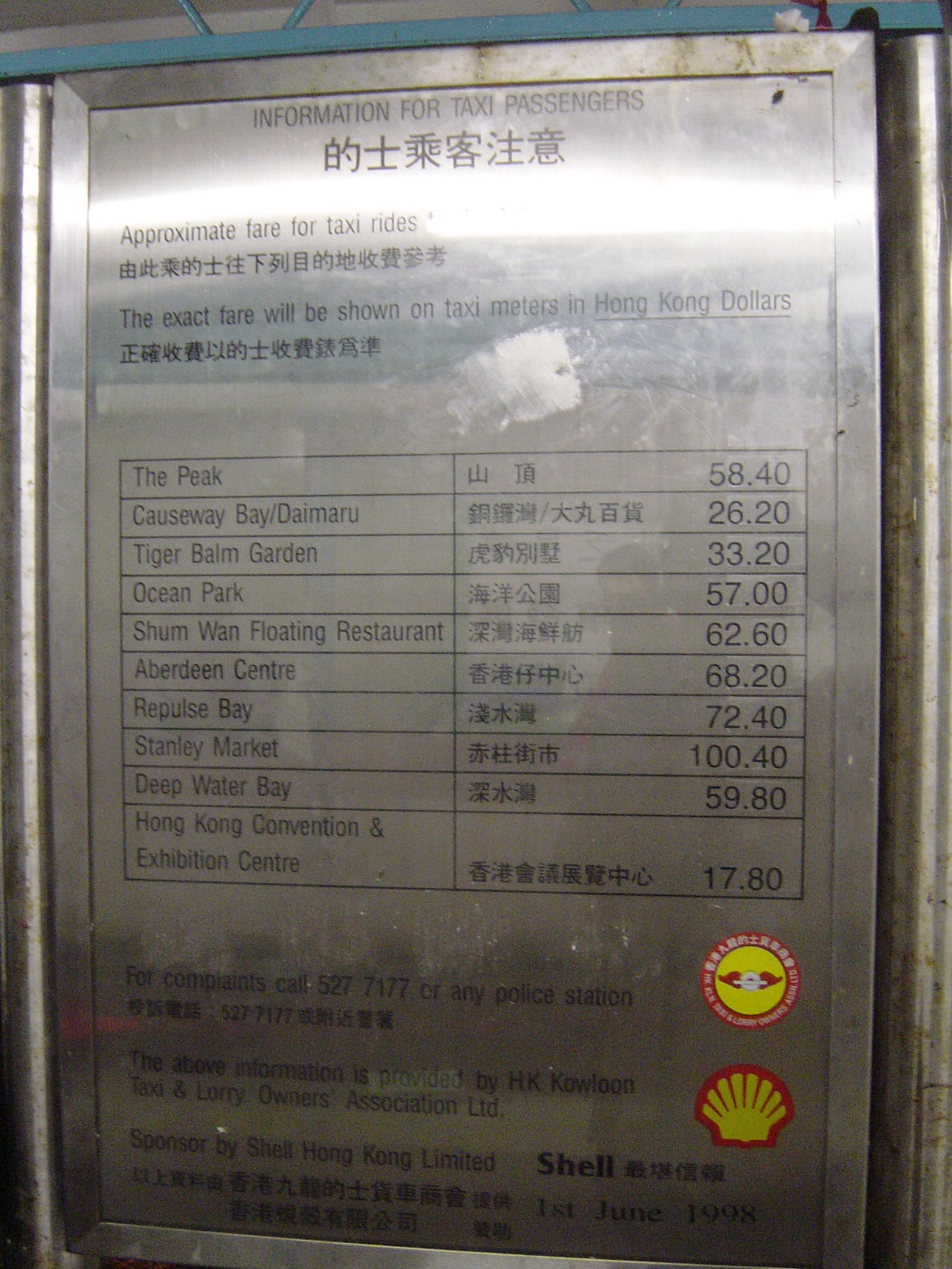 愛丁堡廣場渡輪碼頭（第三代天星碼頭）的的士車資表。Taxi Fares List in Edinburgh Place Ferry Pier (ex-Star Ferry Pier), Central, Hong Kong.